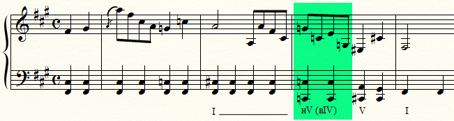 Прокофьевская двойная доминанта (фрагмент Гавота)